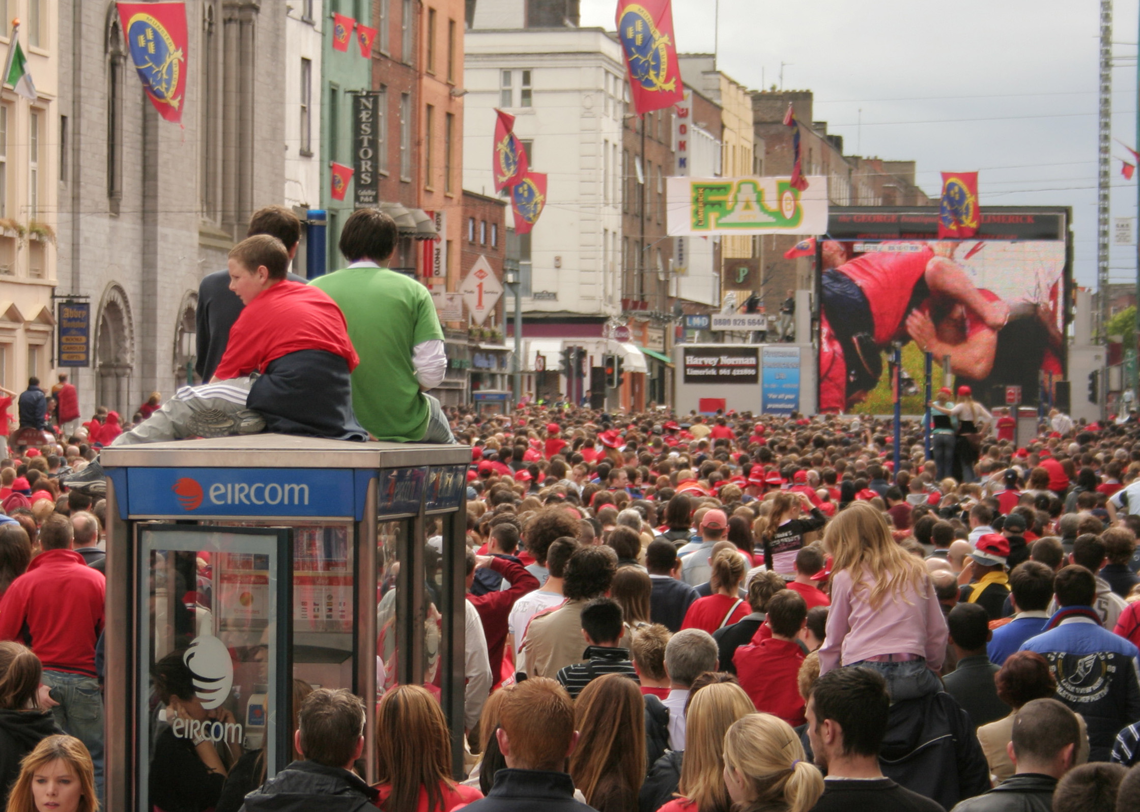 Munster fans in Limerick during the 2006 Heineken Cup